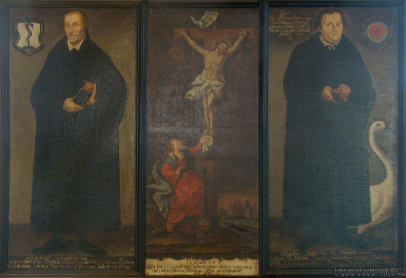 Martin Luther, Philipp Melanchthon sowie Kreuzigungsdarstellung, historisches Gemälde in der Kreuzkirche in Bretten